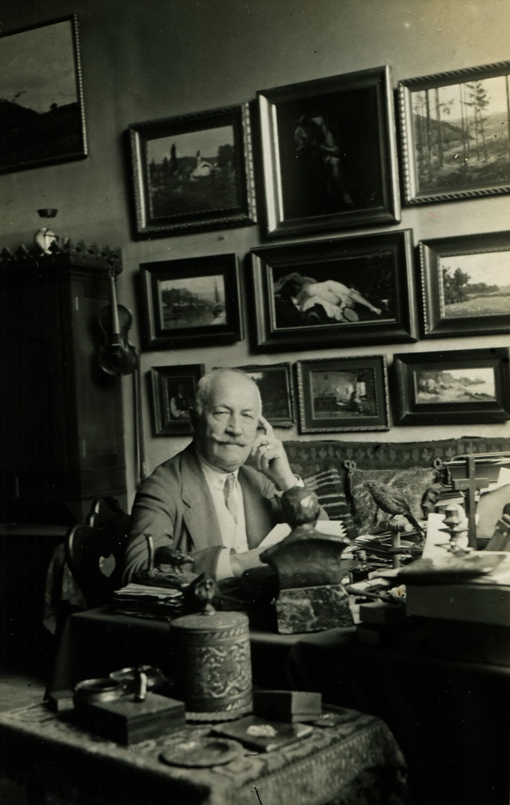 fénykép Túry Gyuláról